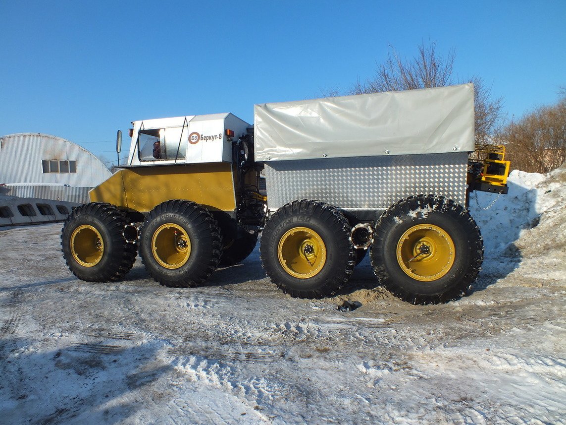 Беркут-8 первого поколения с буровой установкой